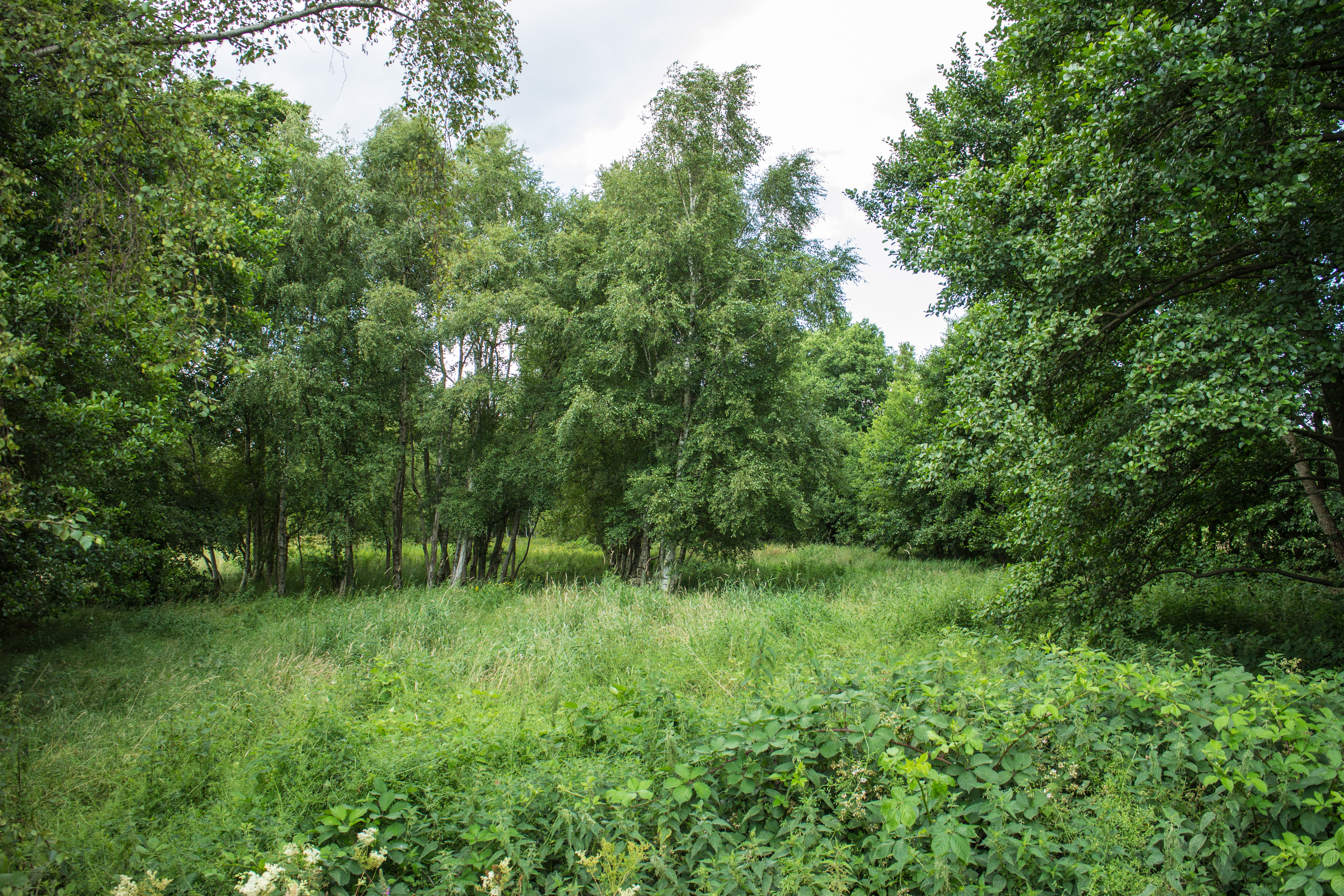 Moor zwischen Neu Wulmstorf und Rübke an der B3n, NSG Moore bei Buxtehude